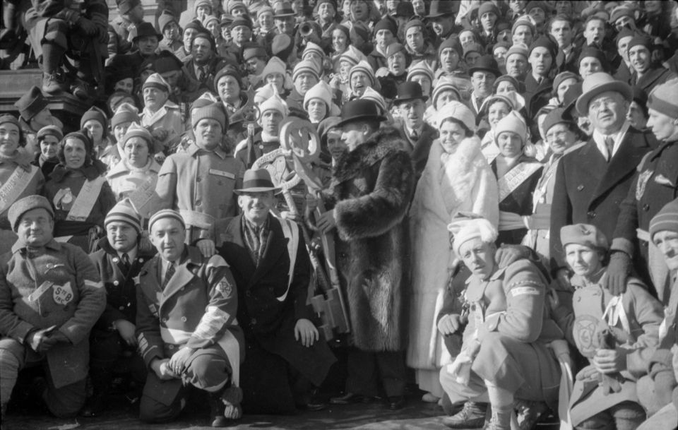 Le maire de Montréal, Adhémar Raynault, en manteau de chat sauvage, entouré d'une foule réunissant les membres de plusieurs clubs de raquetteurs en costume.